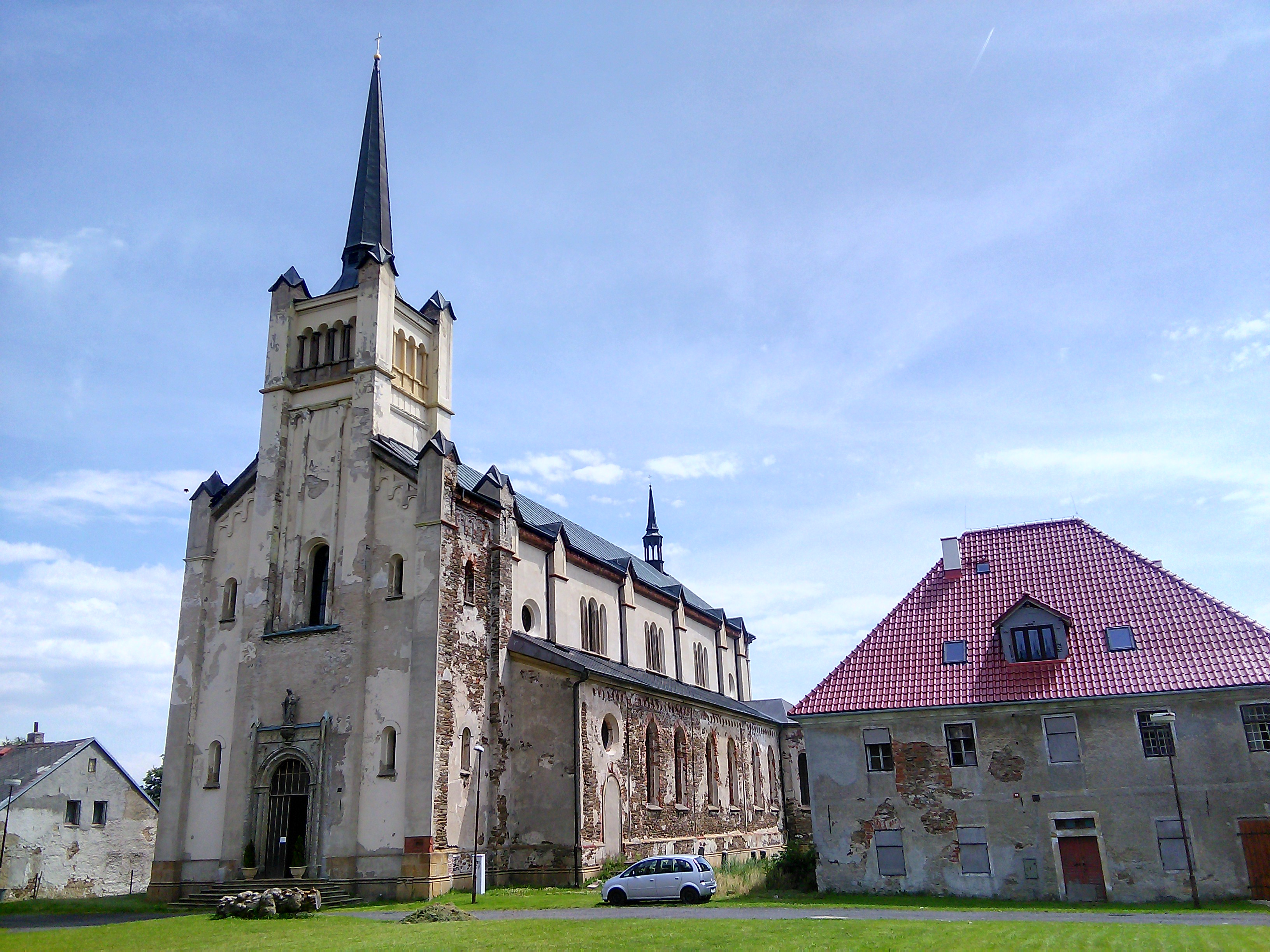 Kostel svatého Václava, Výsluní, okres Chomutov.